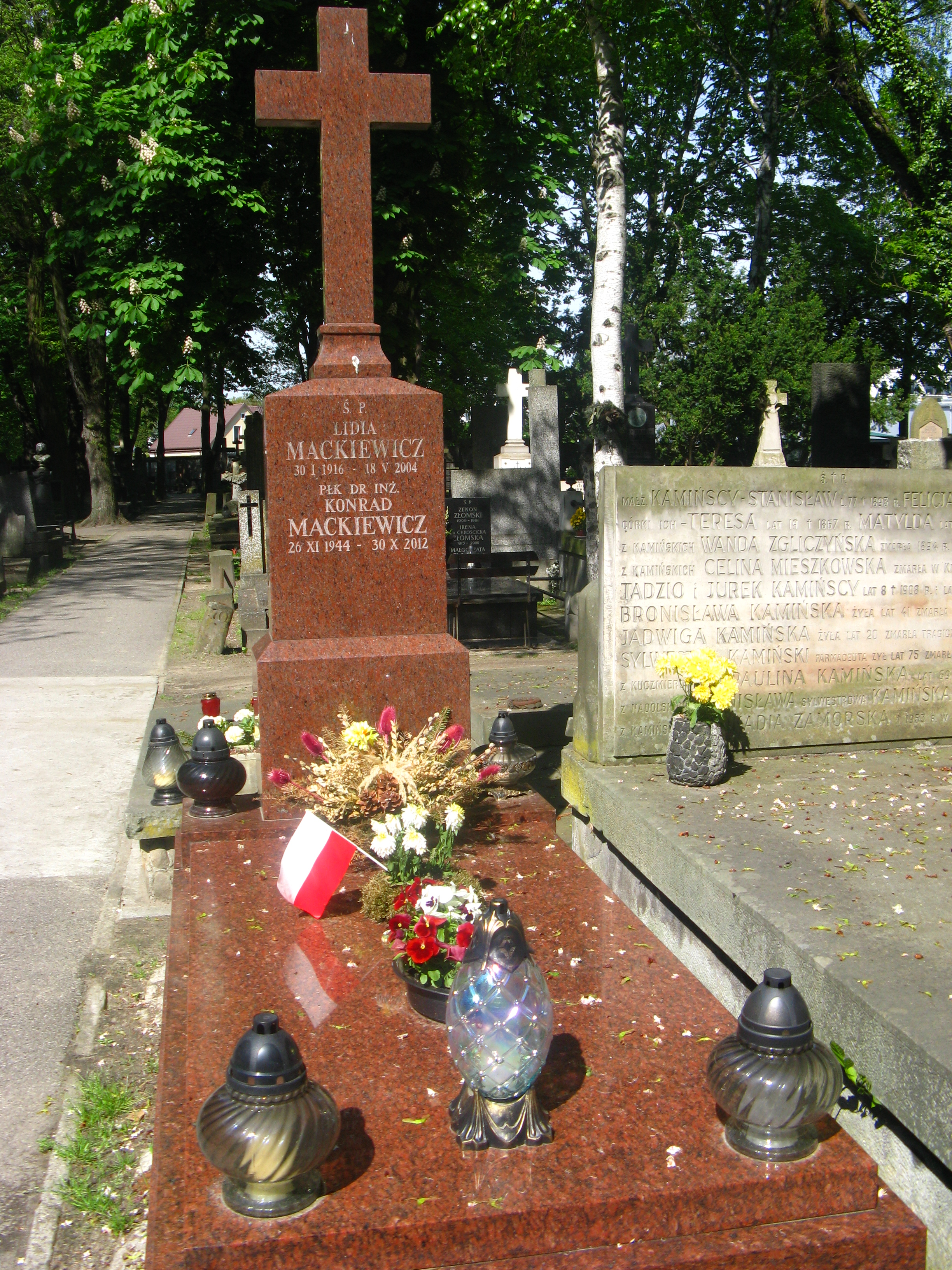 Grób Konrada Mackiewicza na Cmentarzu Powązkowskim w Warszawie